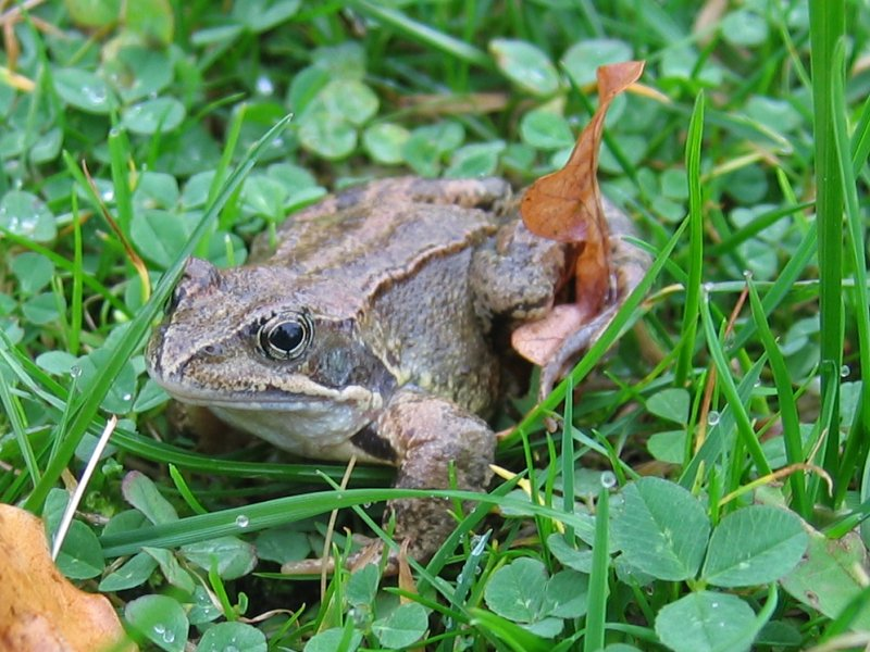 Grasfrosch-Männchen Rana temporaria